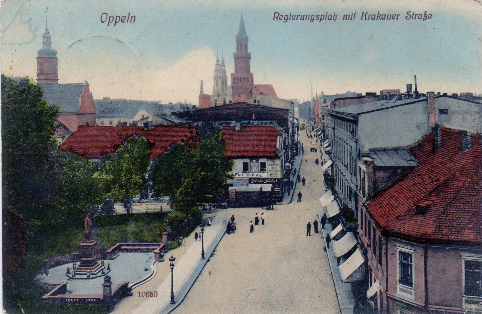 Der ehemalige Regierungsplatz , später Annabergplatz heute plac Wolnosci 1917